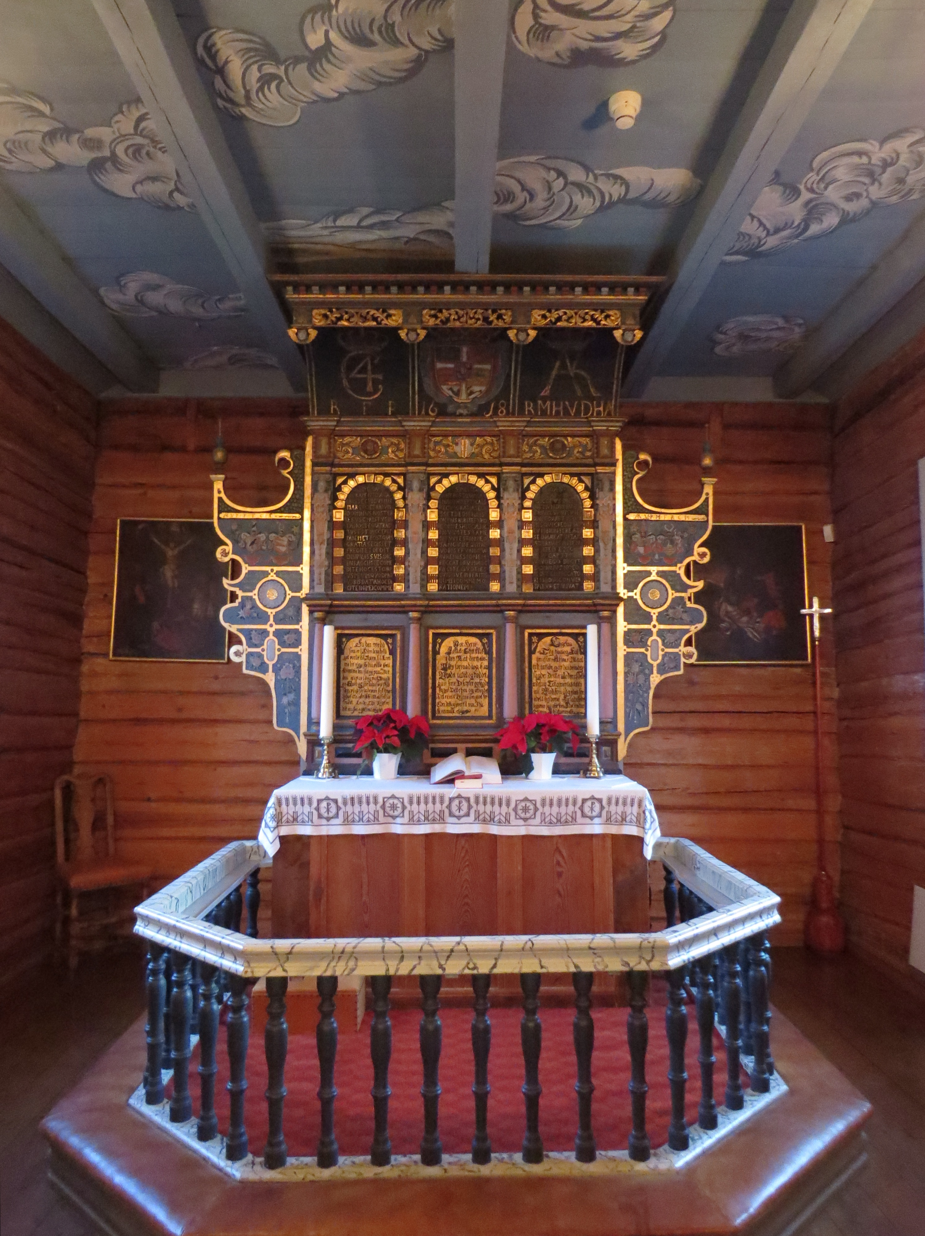 Altertavle, Mælum kirke, Telemark